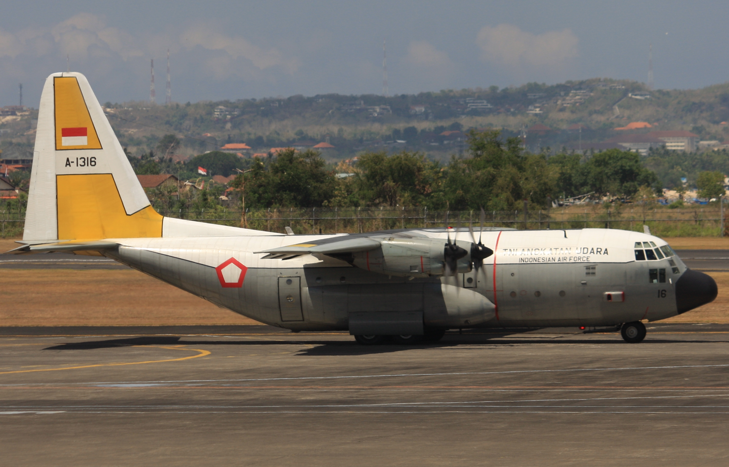 Denpasar / Bali - Ngurah Rai International (DPS / WADD) Indonesia, August 24, 2012.